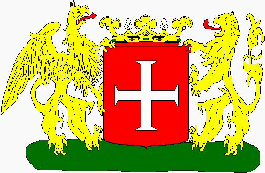 Gemeentewapen Heiloo